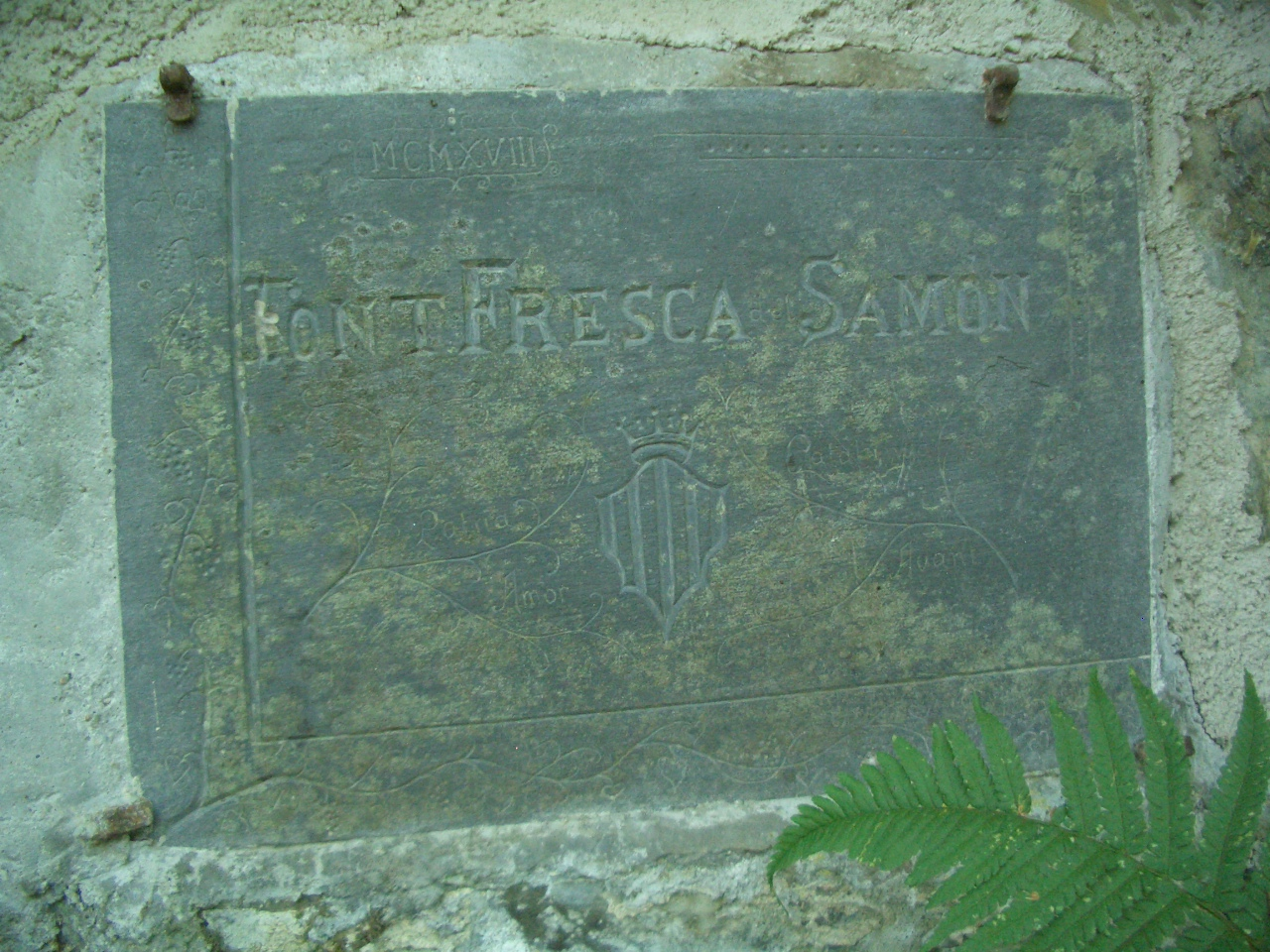 Placa Font Fresca del Samont